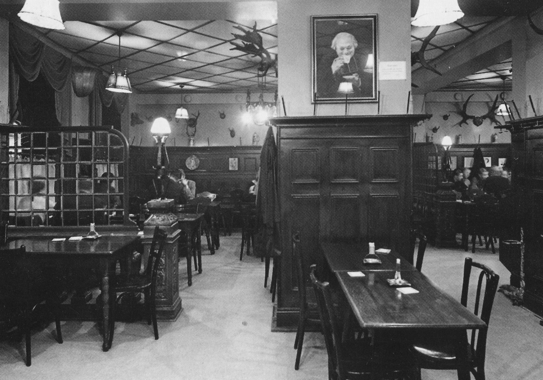 Interiör från Restaurang Löwenbräu